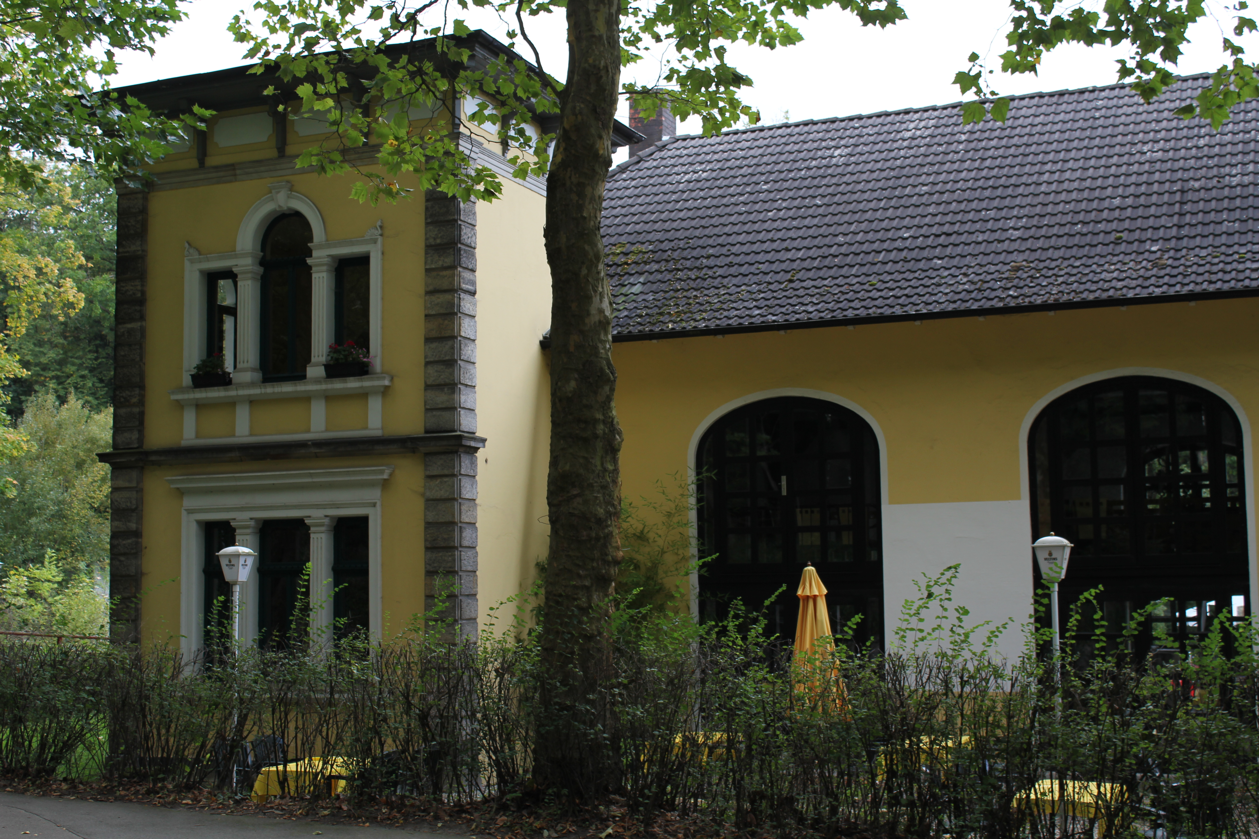 Alte Raststation in Wennigsen - Bredenbeck - Steinkrug, heute Gaststätte